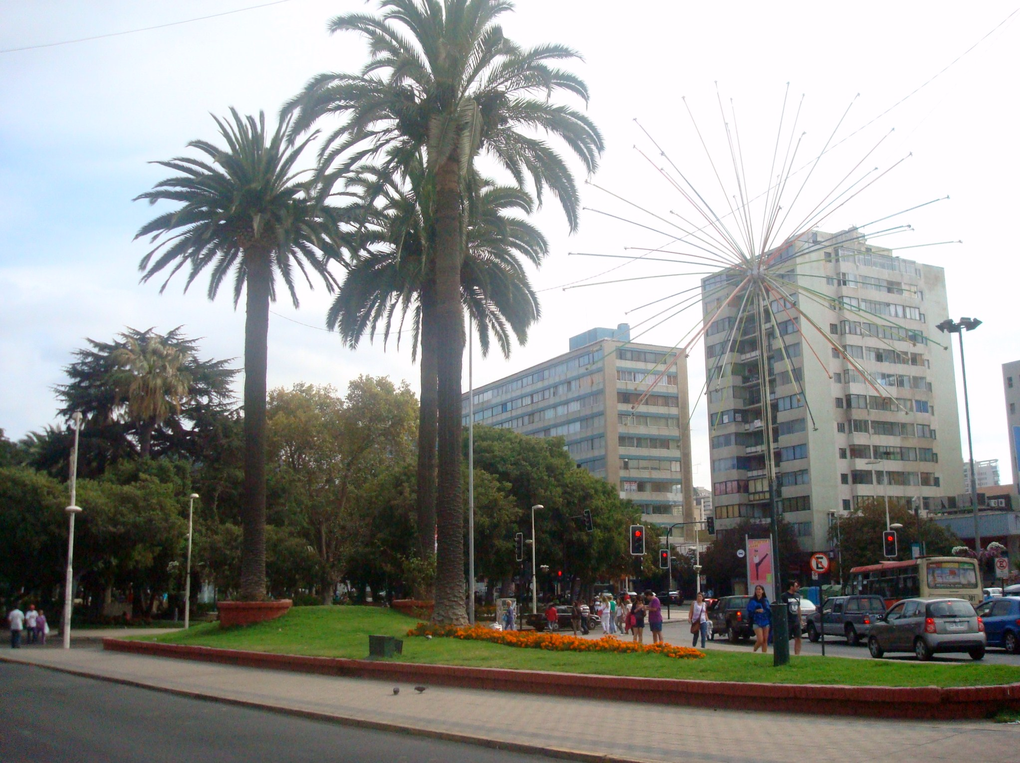 Plaza Latorre, Viña del Mar, Chile